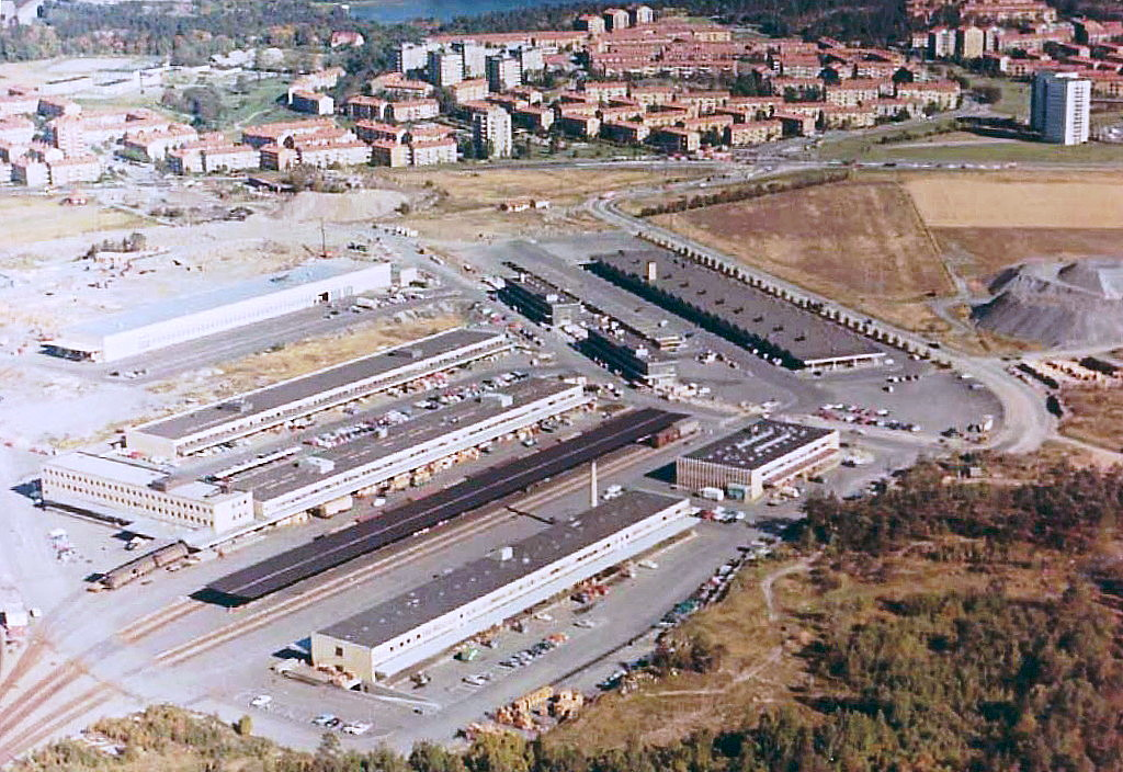 En flygbild tagen över Årsta partihallar 1967.